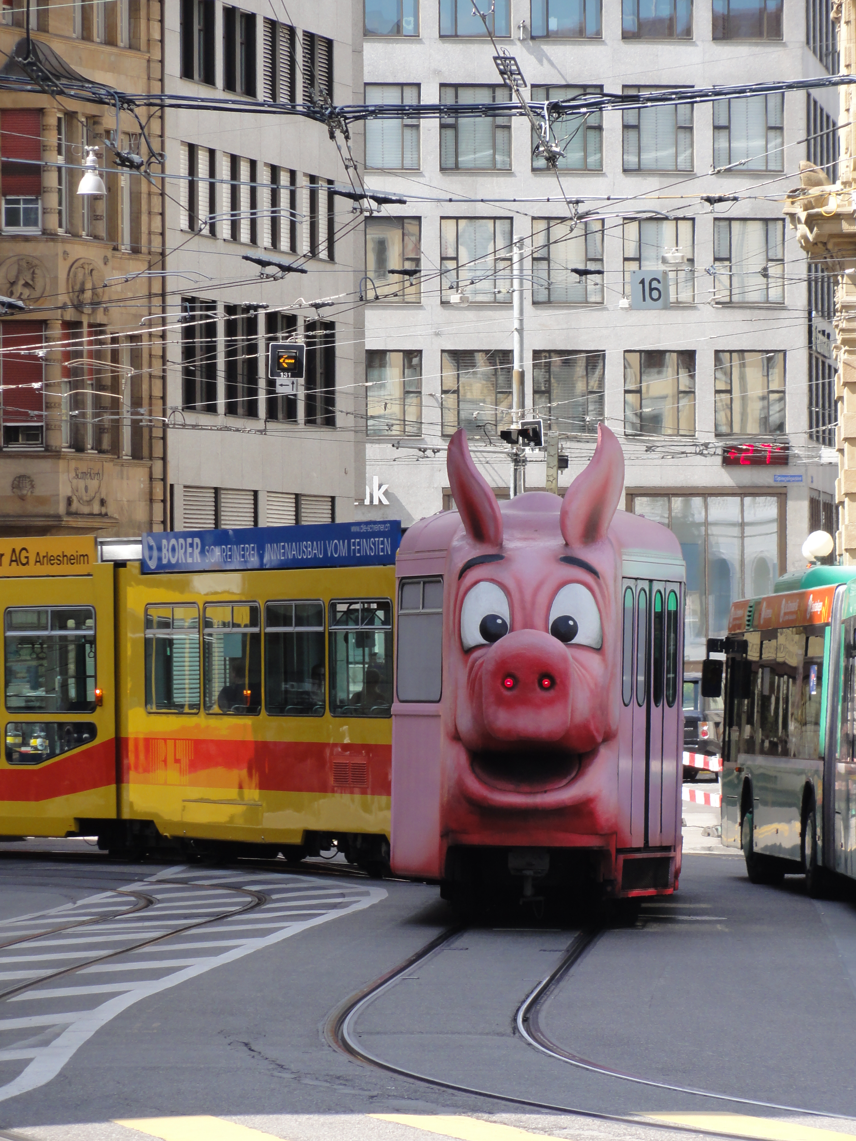 Basel BS — Tram mit großem Schweinskopf am Heck, auf dem Dach eine halbe Münze, in den Nasenlöchern Hecklampen